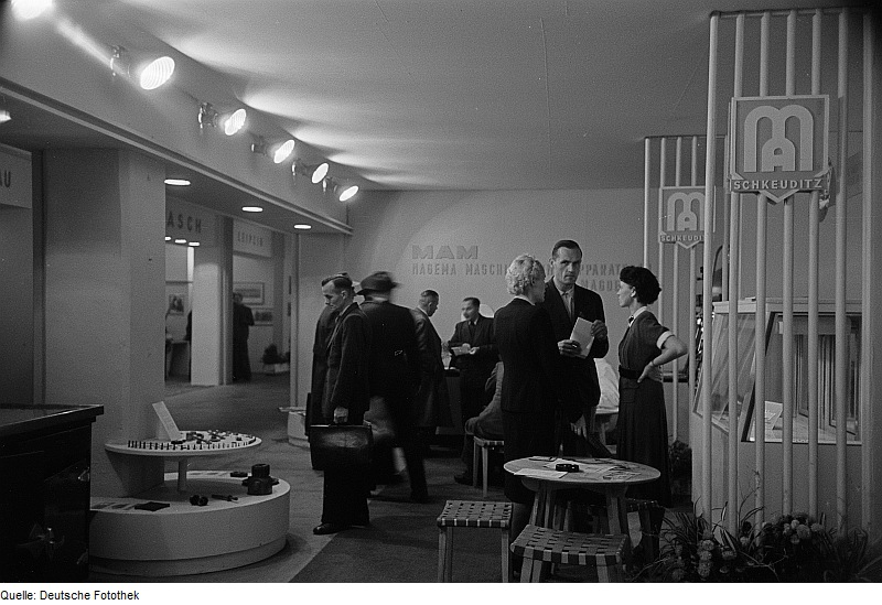 Original image description from the Deutsche Fotothek Messestand der Hagema Maschinen- und Apparatebau Magdeburg und der MA Schkleuditz